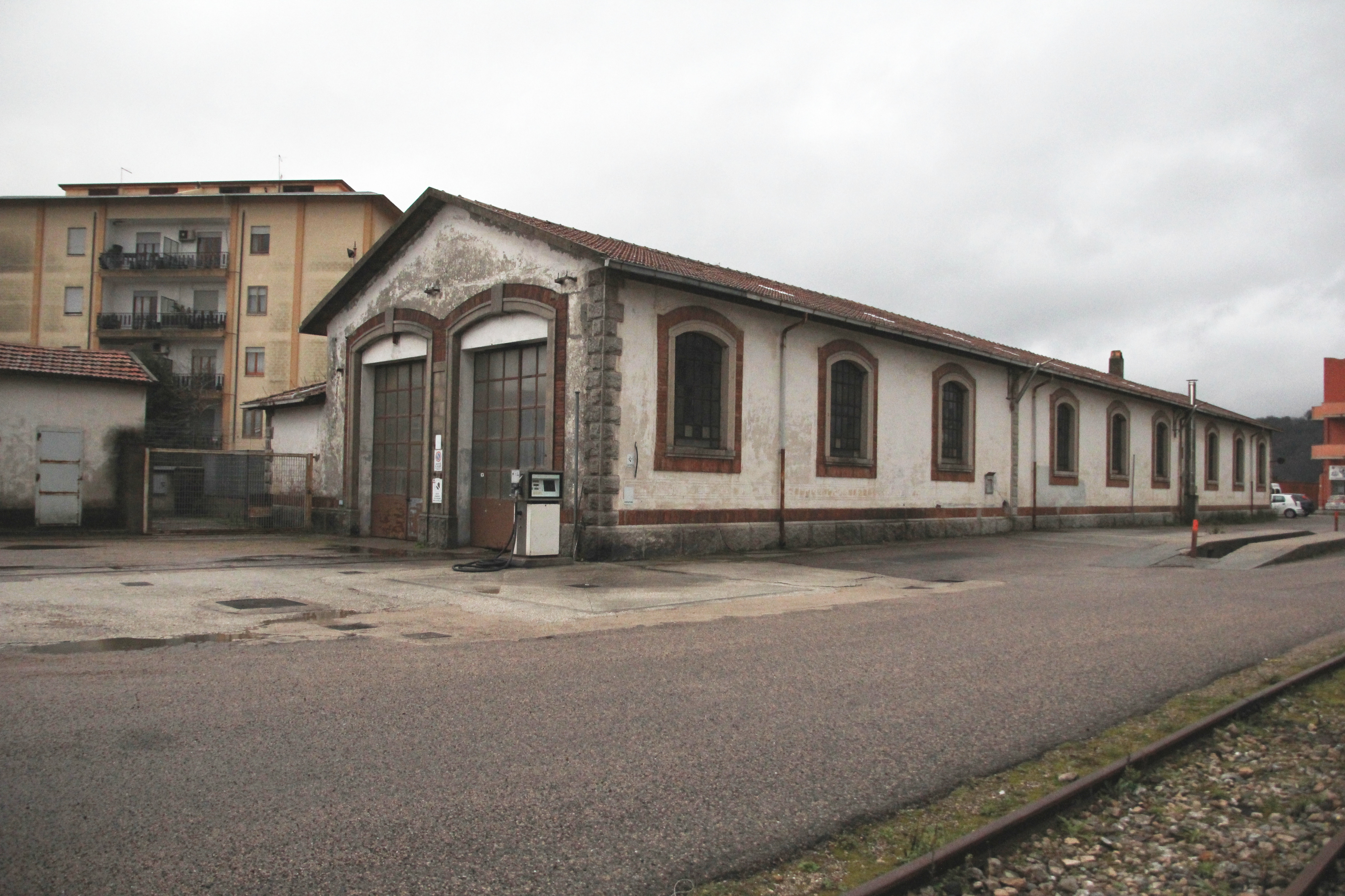 Tempio Pausania - Stazione ferroviaria